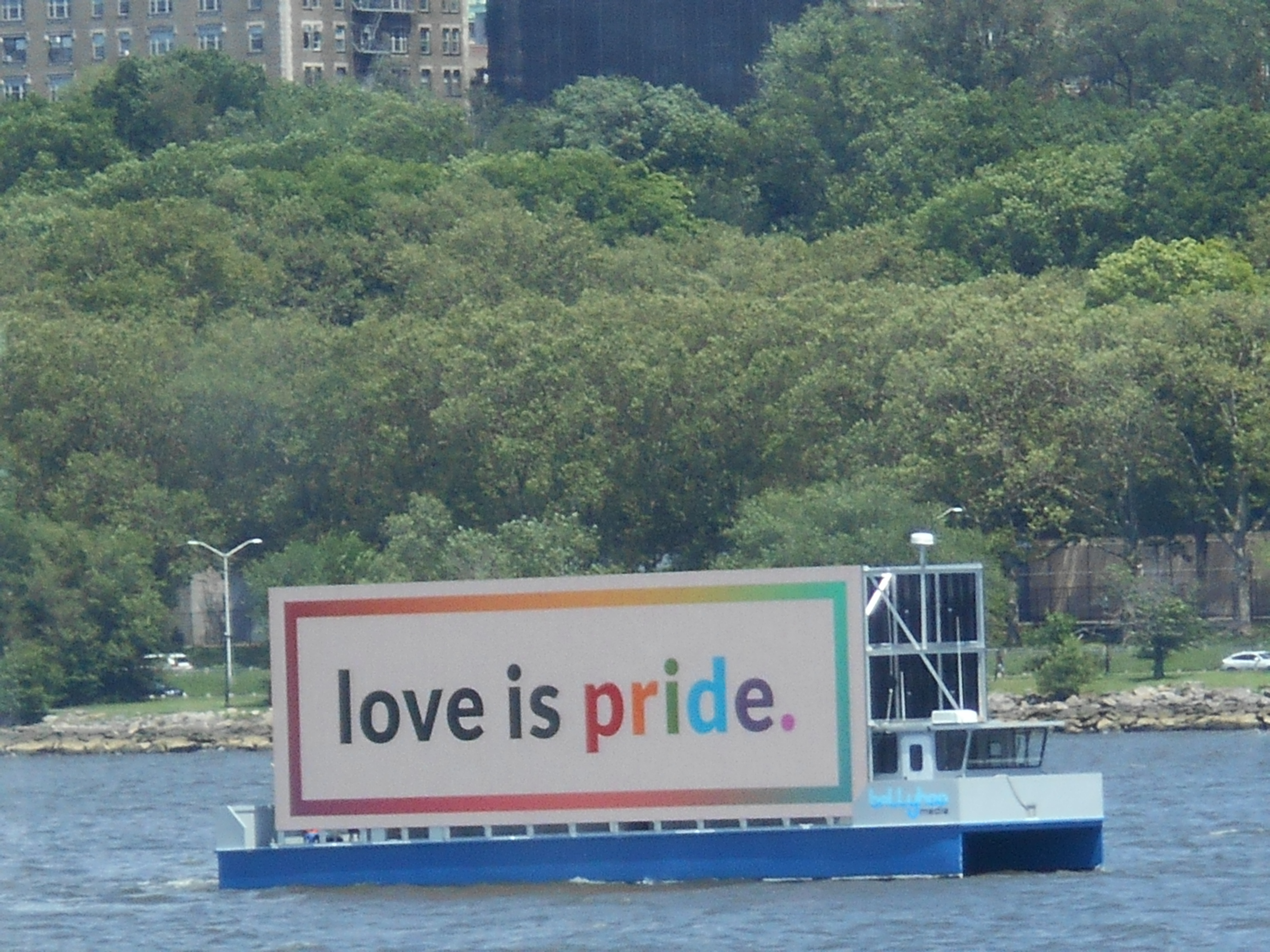 Barke mit dem Gay Pride-Motto auf dem Hudson River, New York City, anlässlich des fünfzigjährigen Jubiläums der Stonewall Riots